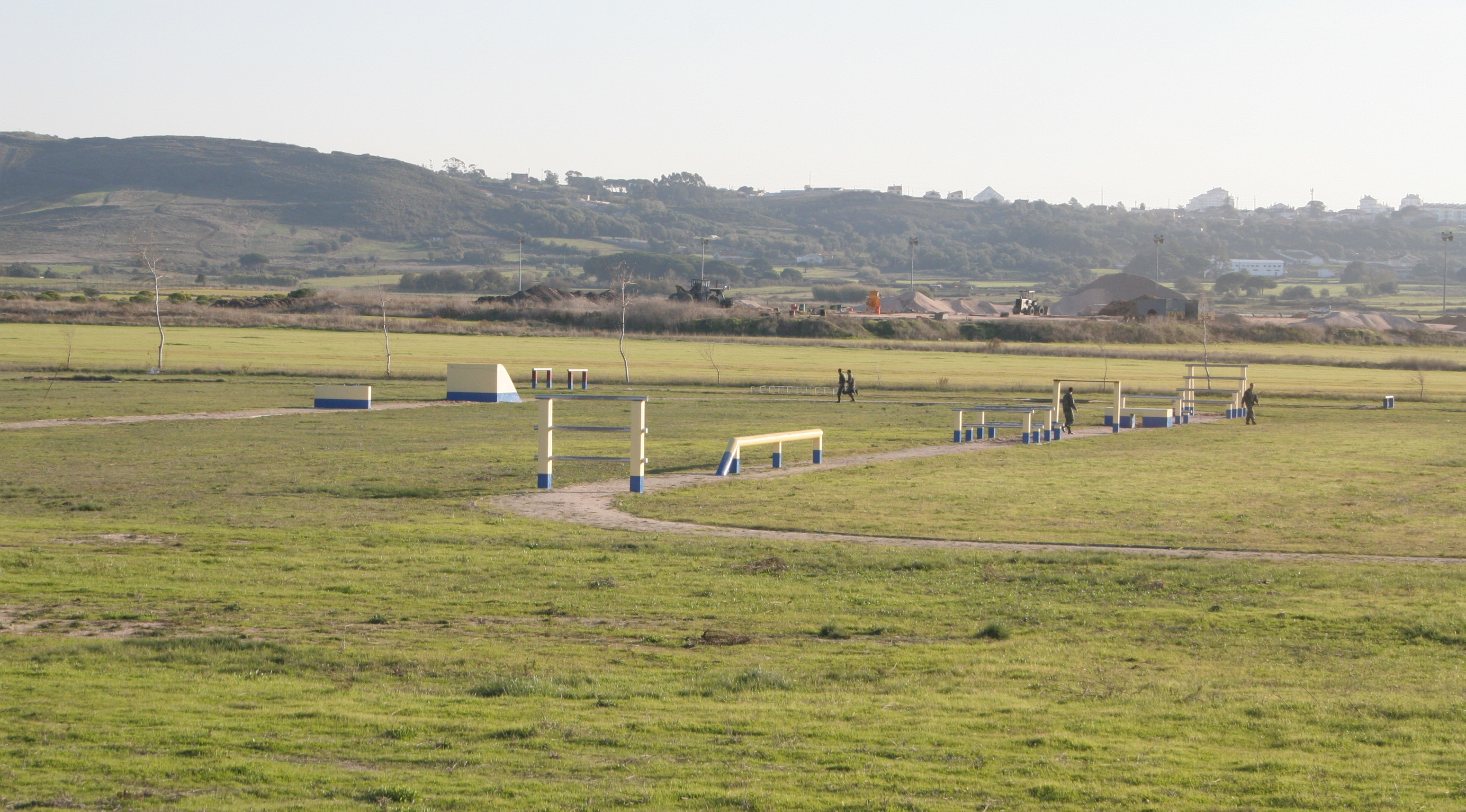 Description